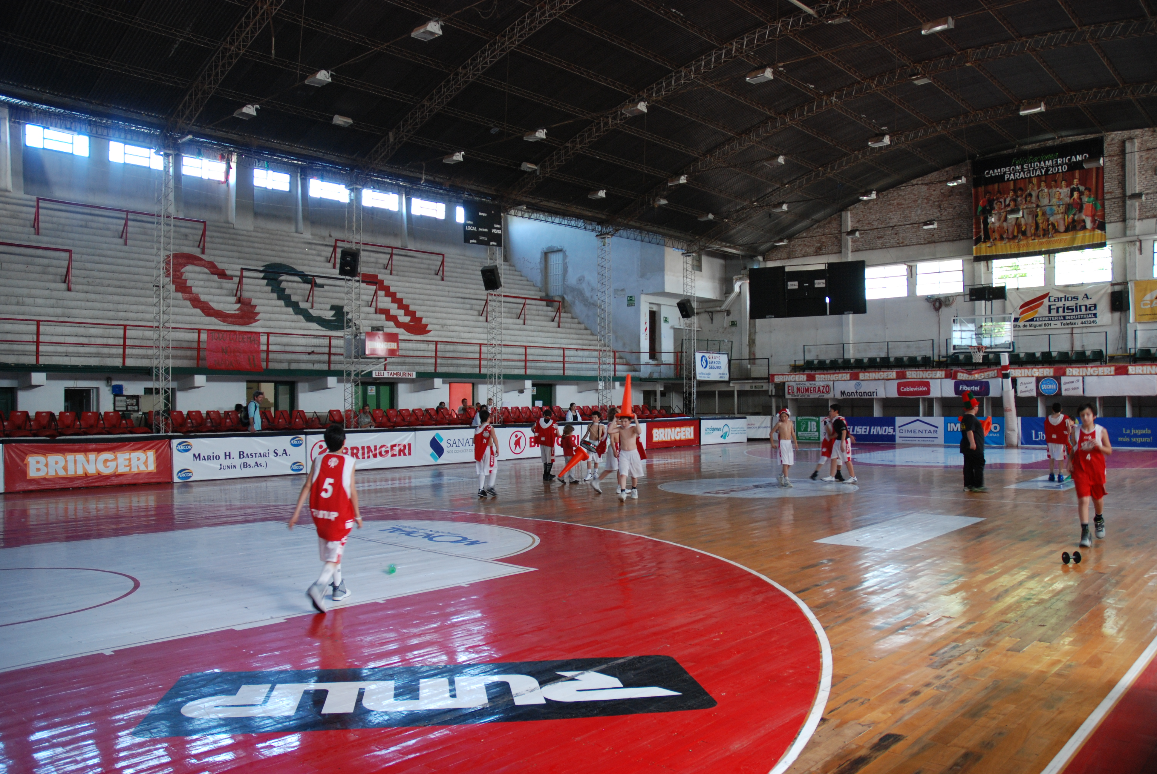 Estadio Coliseo del Boulevard Raúl Chuni Merlo, del Club Ciclista. Avenida San Martín entre Borges y Sarmiento, Junín, Argentina.